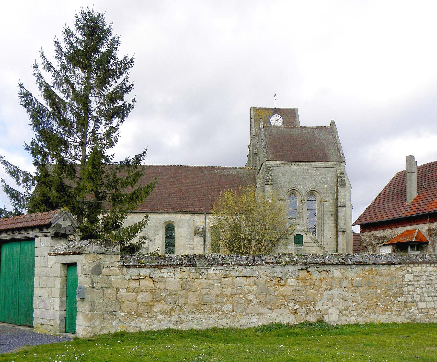 Église Saint-Martin et Saint-Léonard de Vez (60). Vue méridionale.